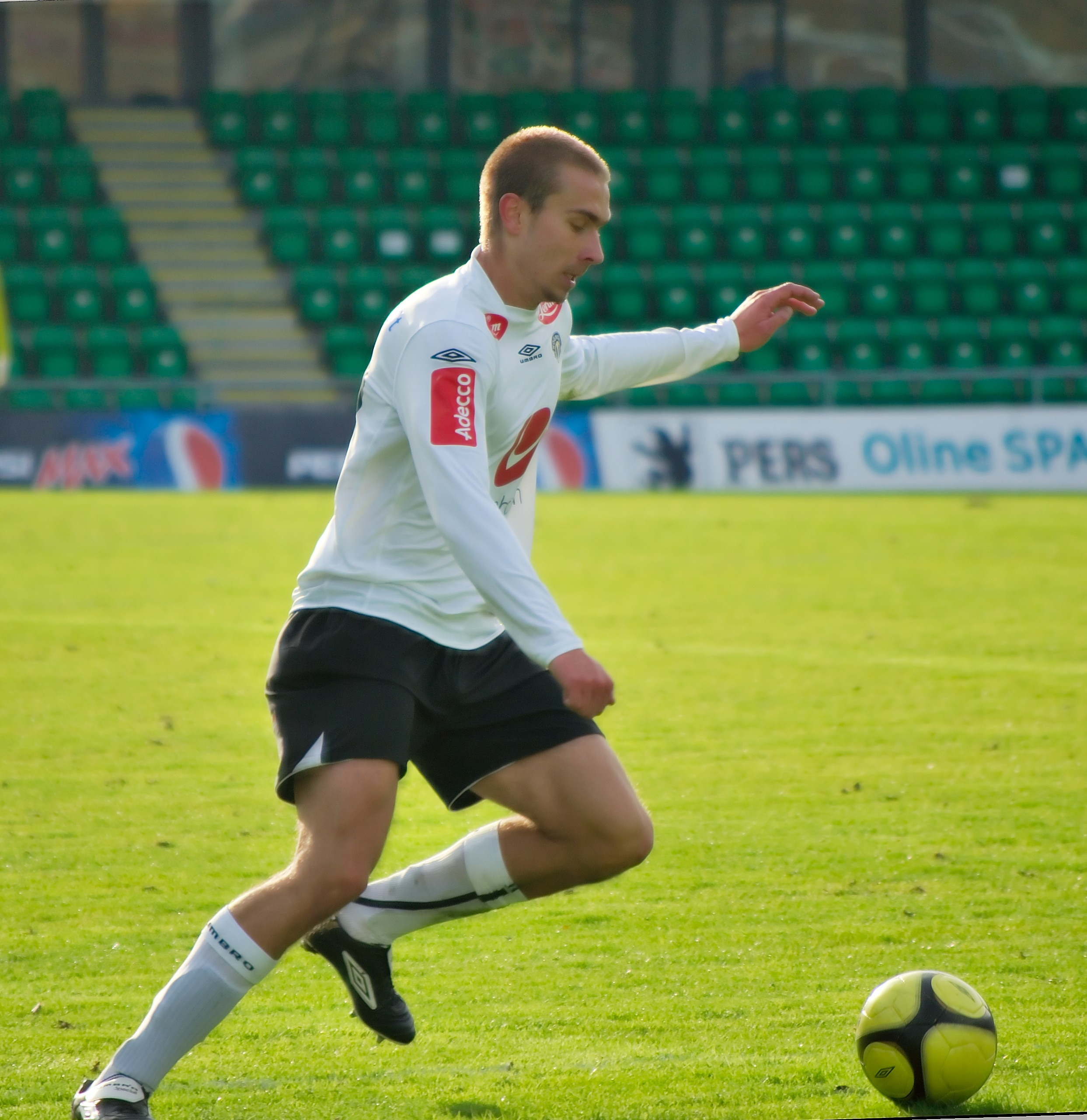 Lukaz Nadolski